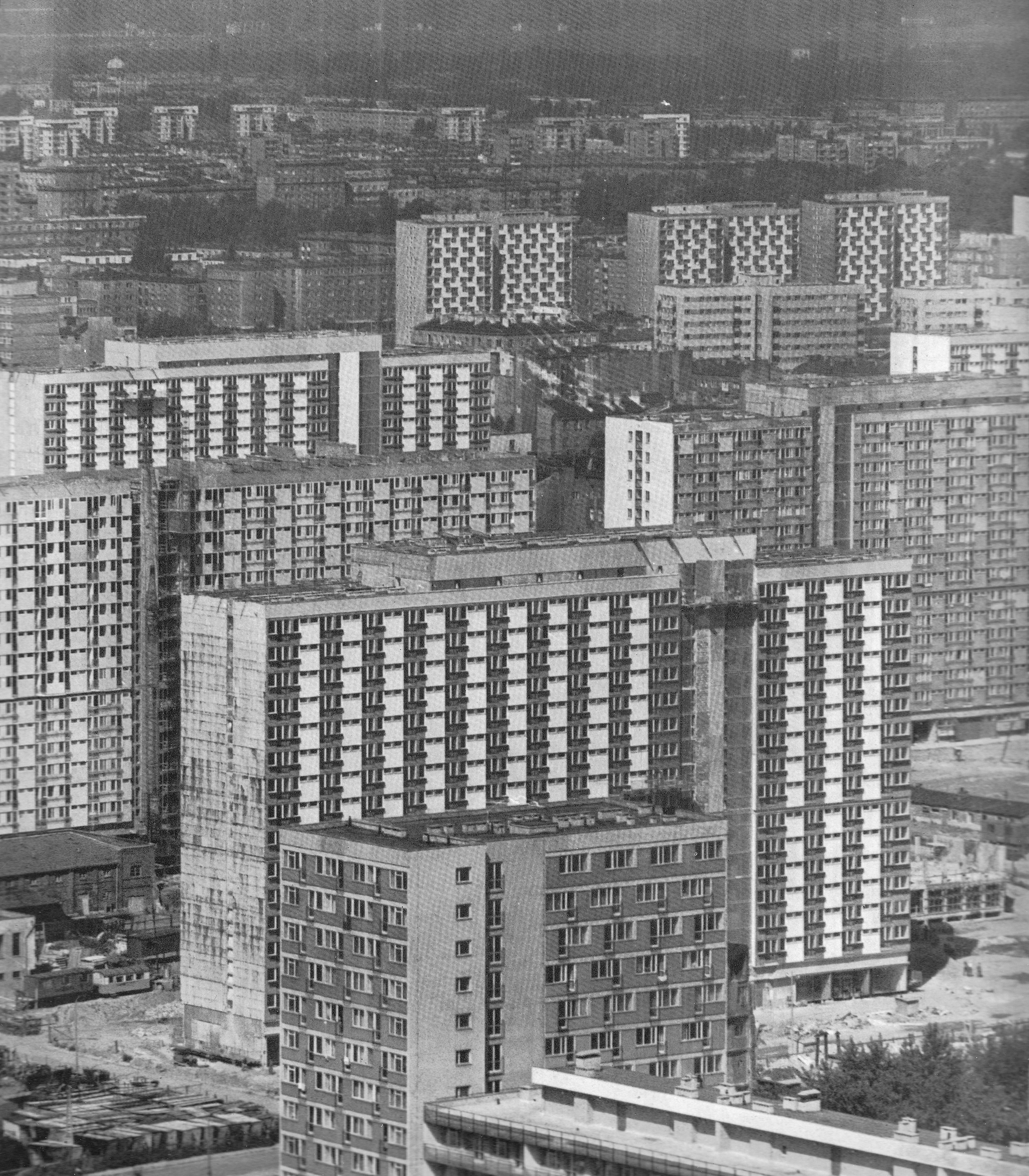 Osiedle Za Żelazną Bramą w Warszawie